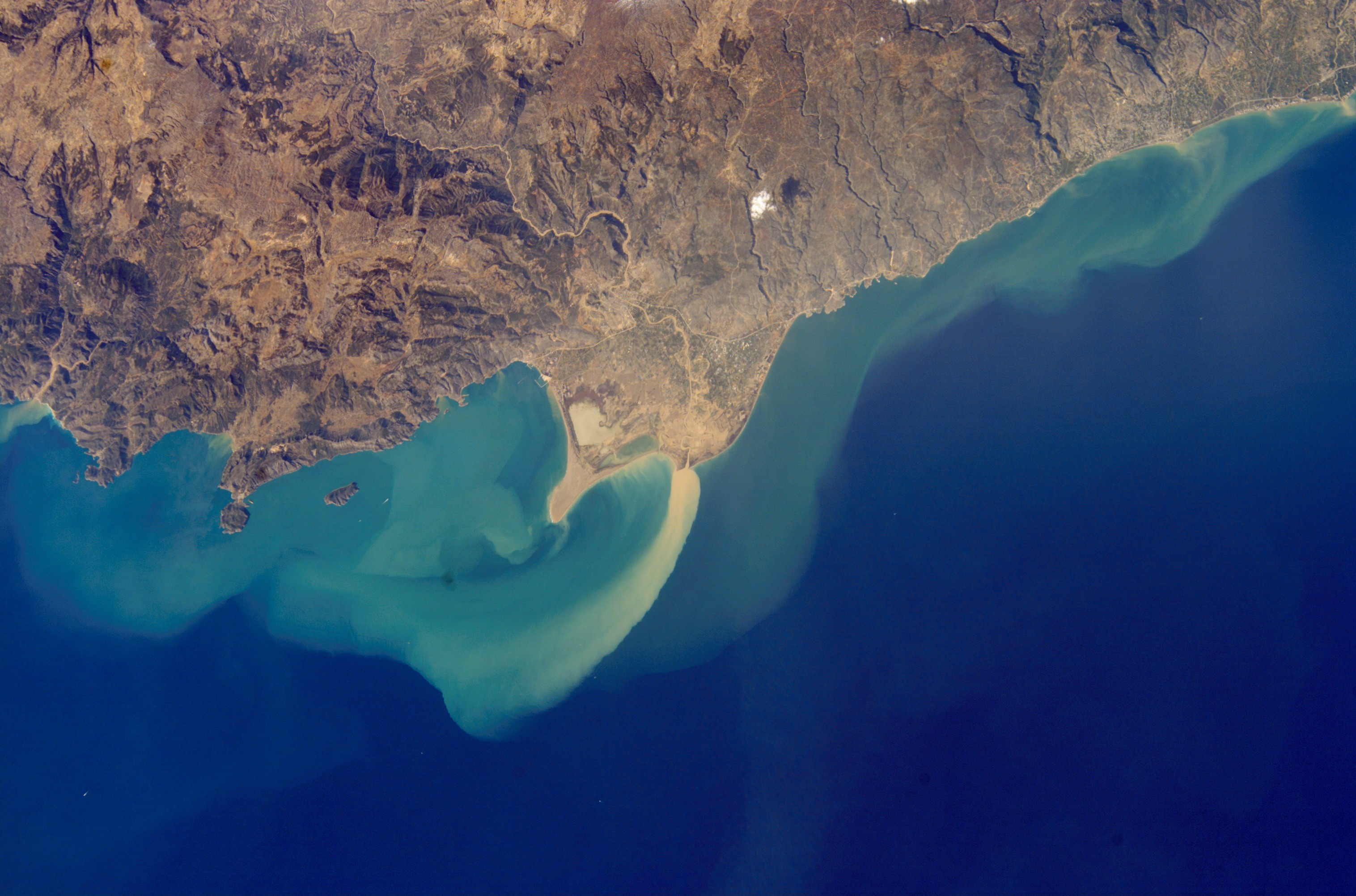 Göksu Nehri'nin Silifke Ovasından Akdeniz'e döküldüğü alan. Şiddetli erozyonun eseri çamur akıntısı.